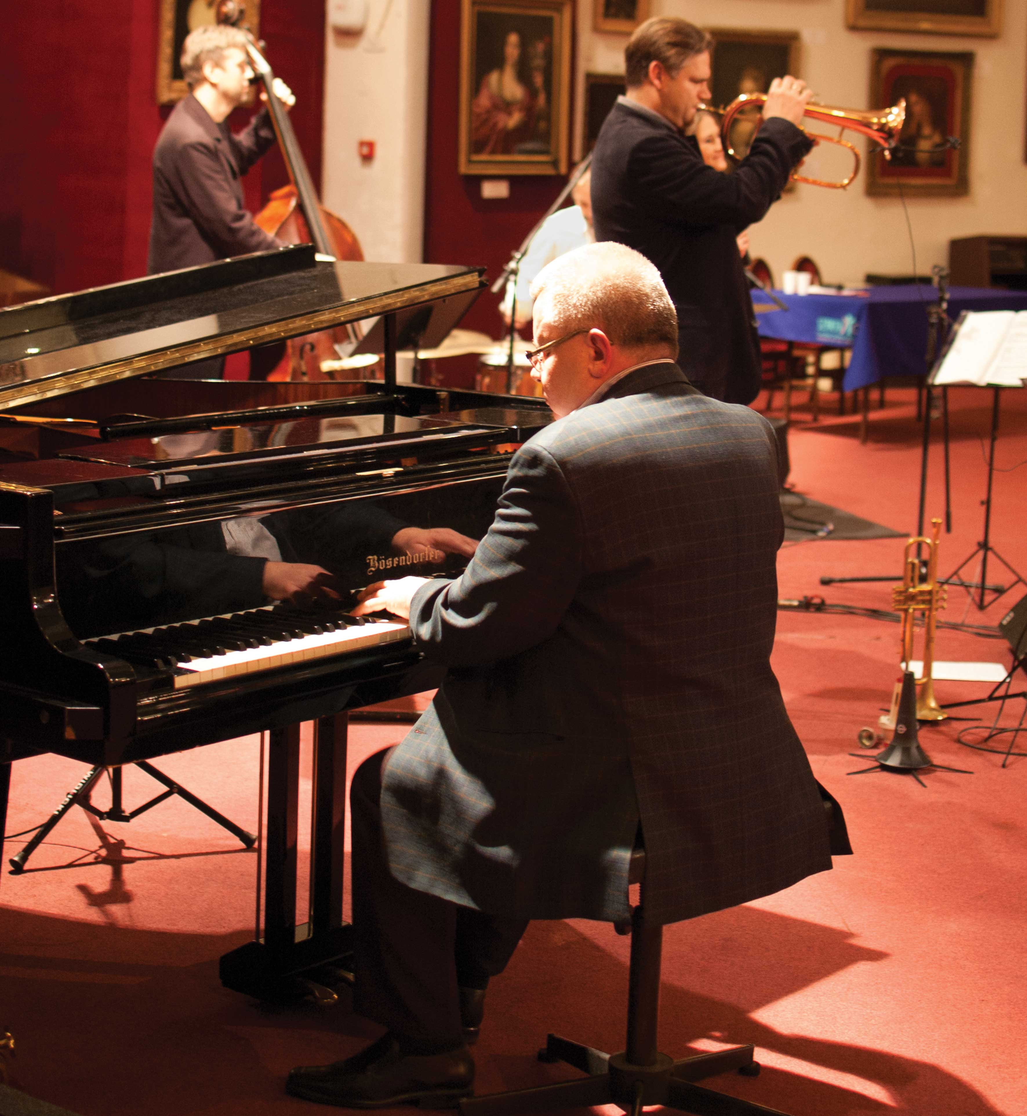 Koncert w Galerii Porczyńskich